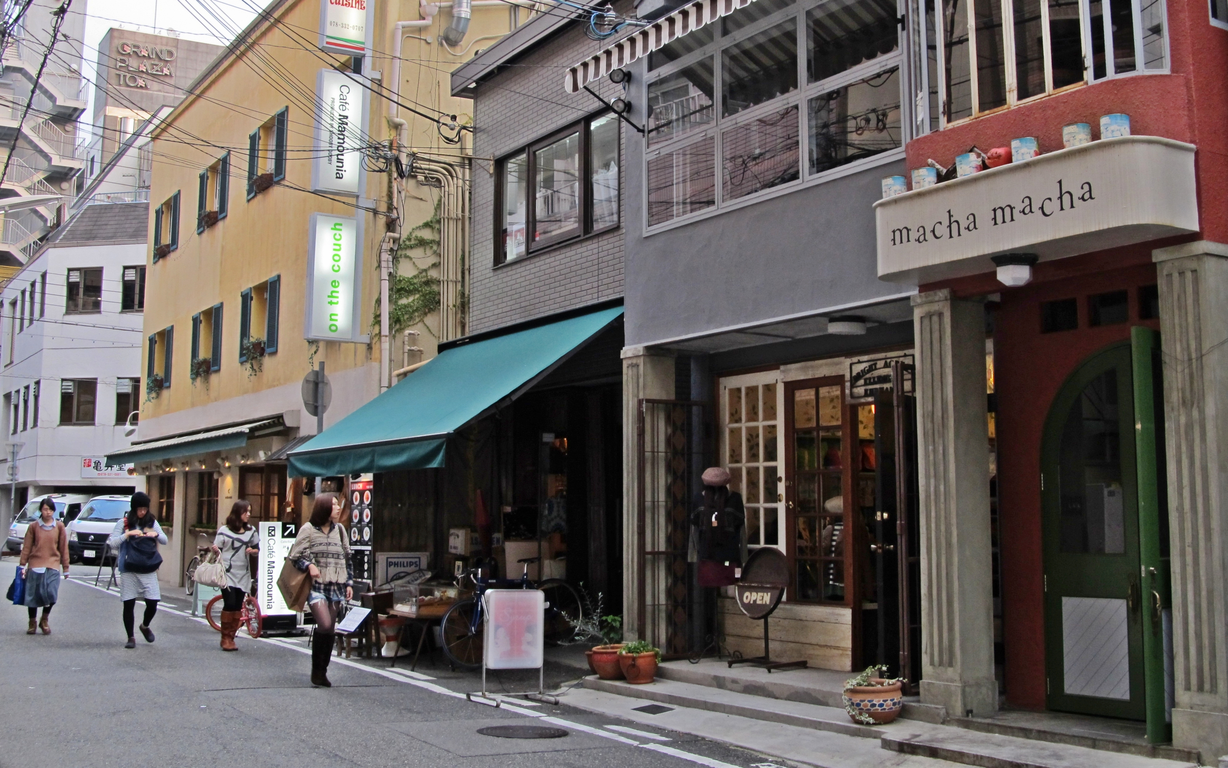 トアウエスト。トアロード西側の商業地域。（兵庫県神戸市中央区北長狭通3丁目）